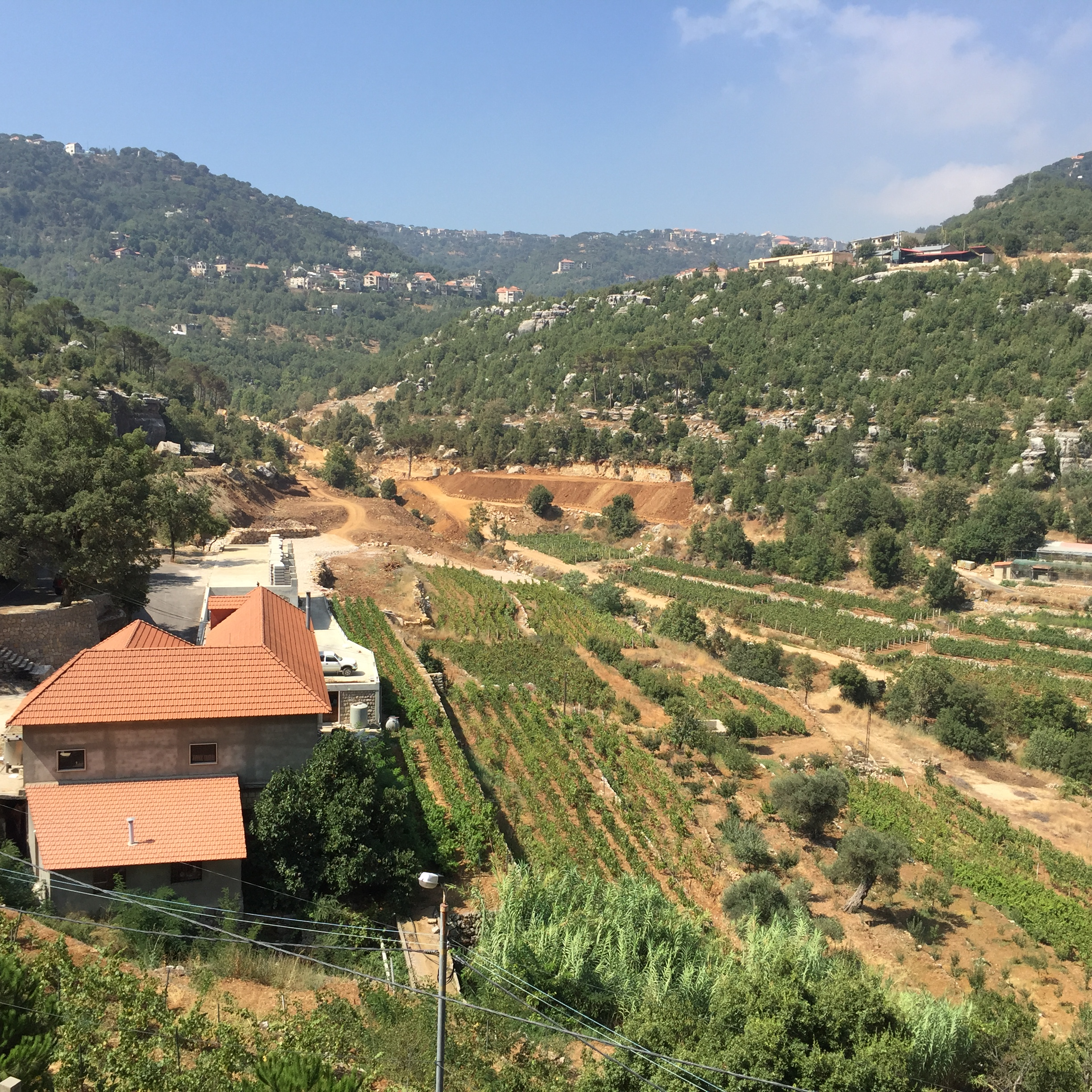 cave a vin